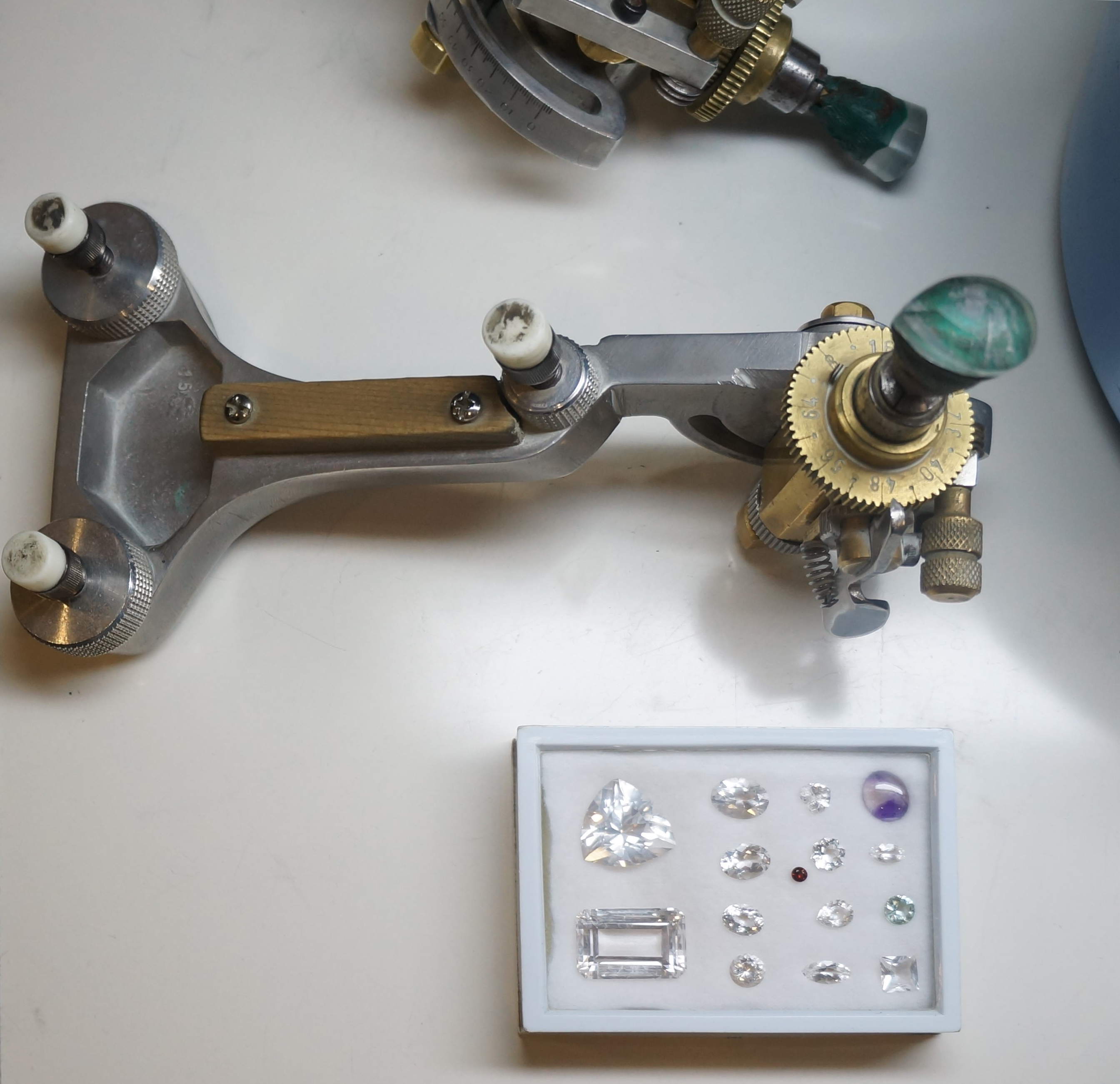 Isini Jewellerie à Kandy Sri Lanka.- Asie du Sud